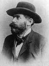 Bernhard Foerster, Antisemitic German Writer of 19th Century